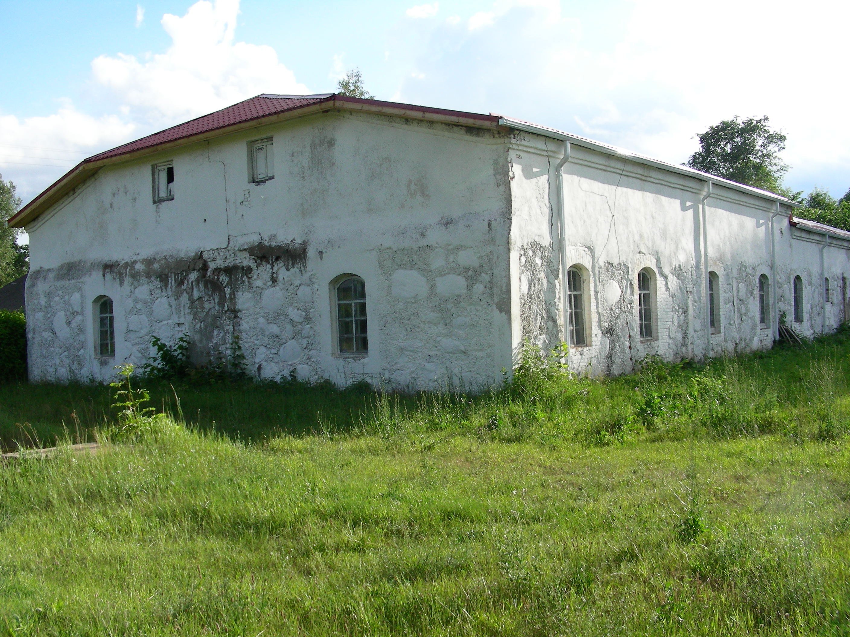 Беларуская (тарашкевіца): Фрагмэнты былой сядзібы «Кухцічы»: кальвінскі збор, парк, афіцына, гаспадарчыя пабудовы, стайня, млын. пас. Першамайск This is a photo of Belarusian heritage monument. Reference number: 612Г000628 ( WLM)